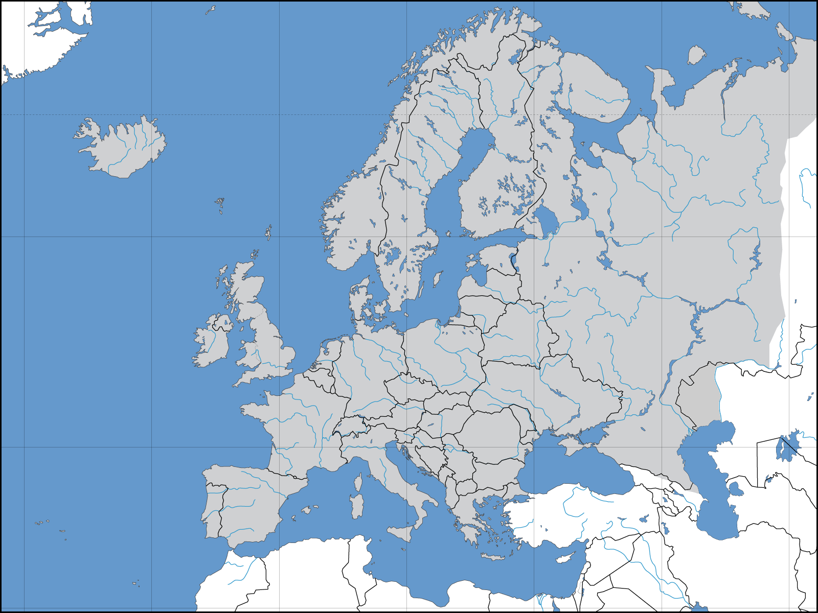 Politische Karte des Kontinents Europa. Leere Lagekarte zur Darstellung der Lage von Staaten in Europa. Europa ist grau hervorgehoben.